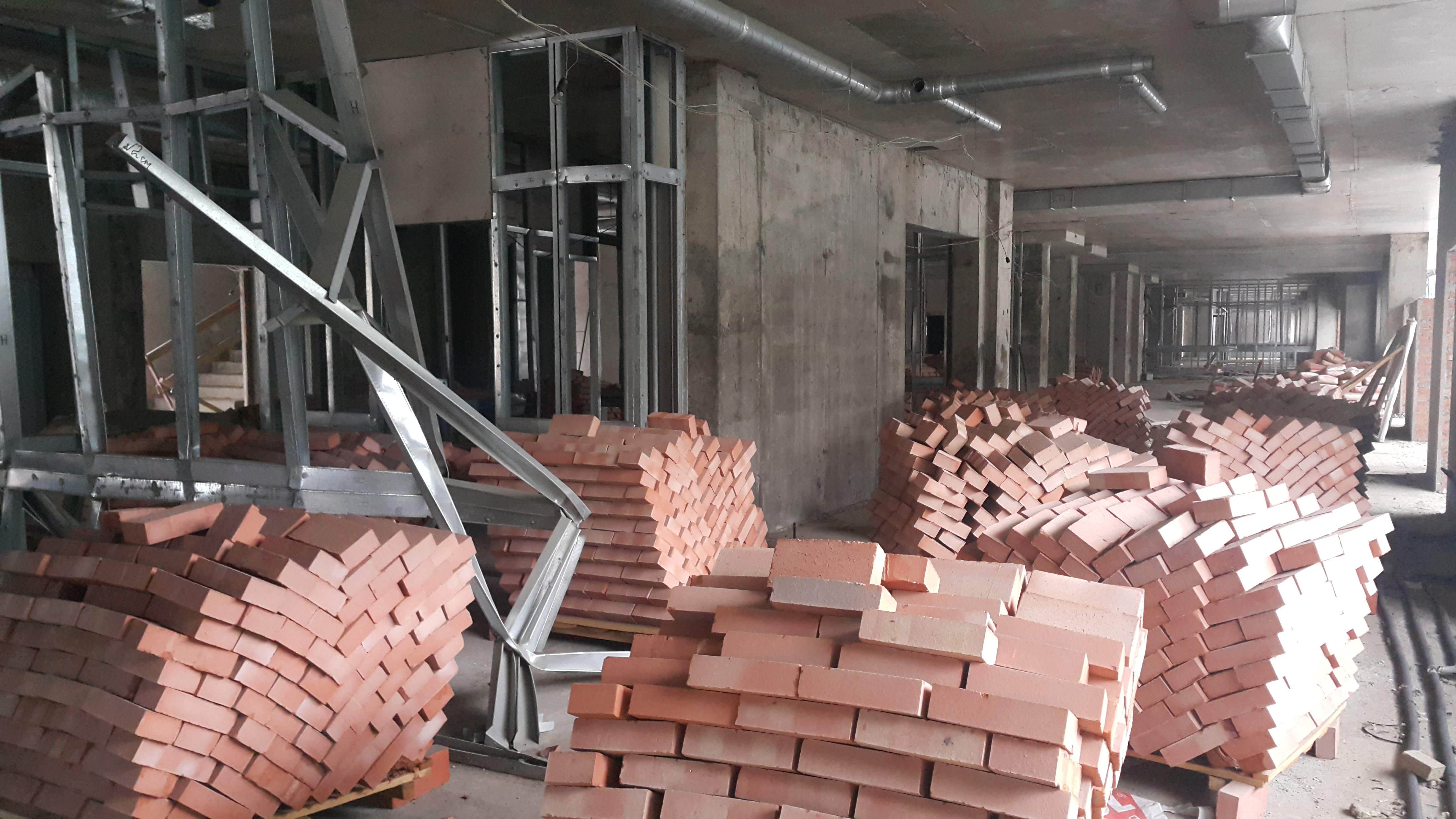 Паллеты с кирпичами в недостроенном госпитале ВЦЭРМ МЧС